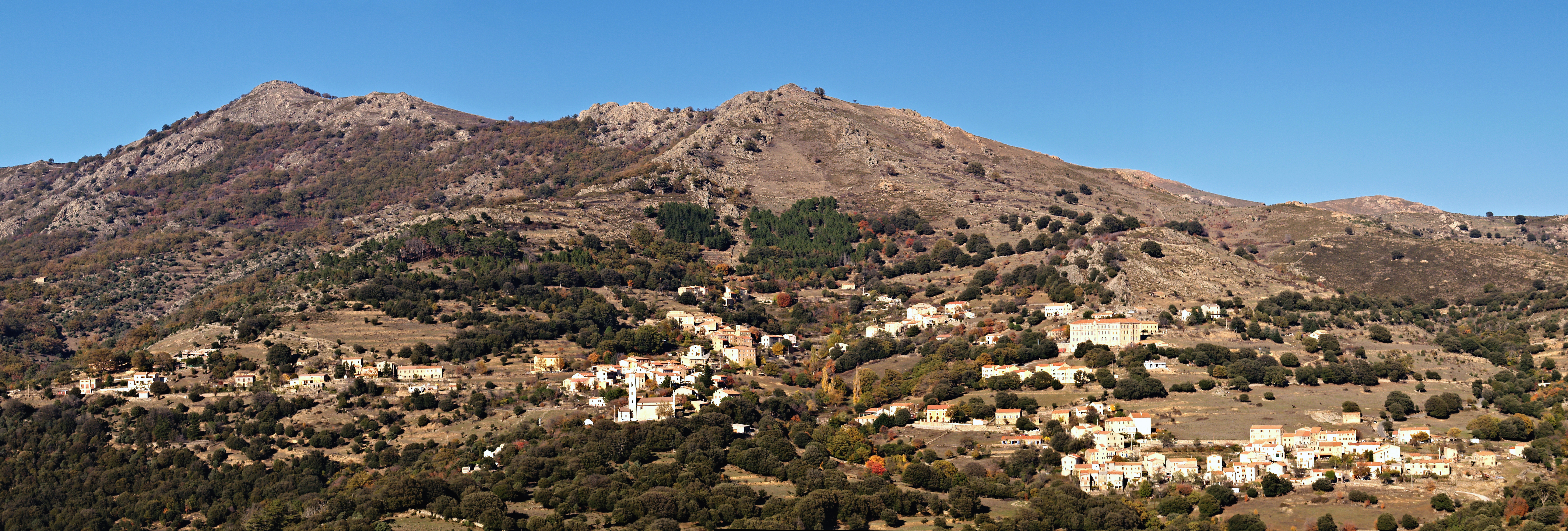 Olmi-Cappella (Corsica) - Panorama du village